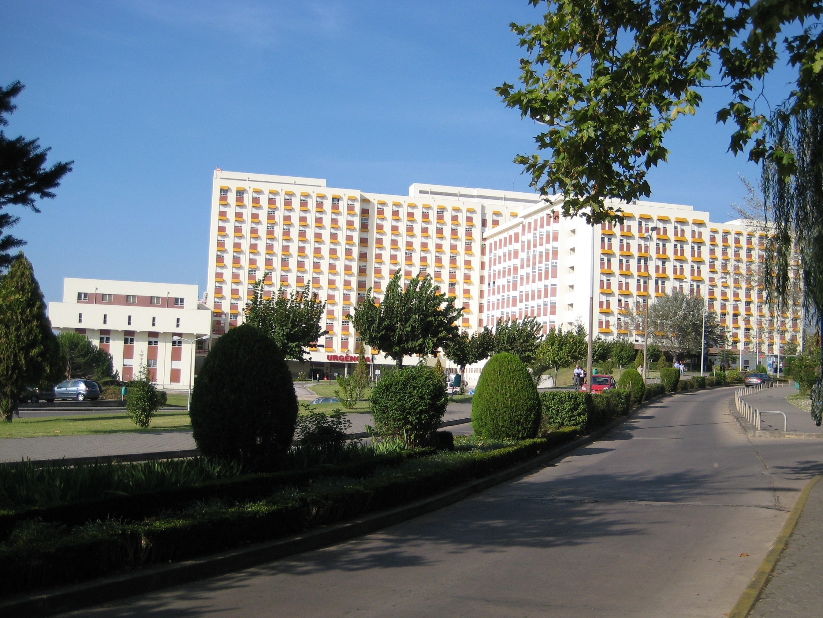 Foto do polo HUC